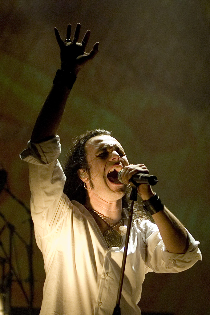 Moonspell, Coliseu dos Recreios, 31 de Outubro 2007 website